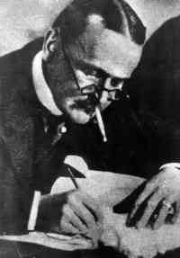 Ульрих фон Брокдорф-Ранцау, германский посол в Дании в годы Первой Мировой войны